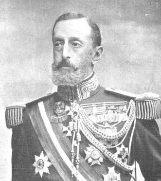 El militar español Joaquín Milans del Bosch